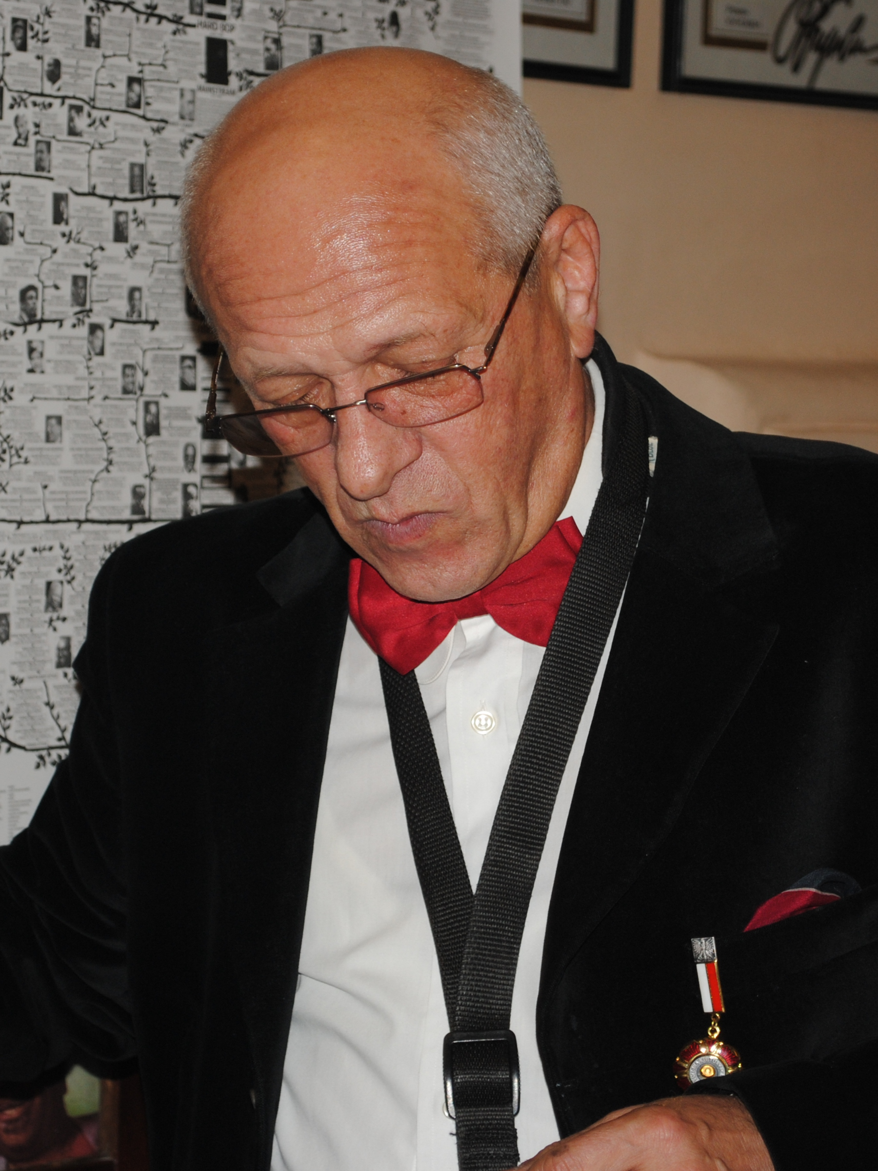 Санкт-Петербург, филармония джазовой музыки